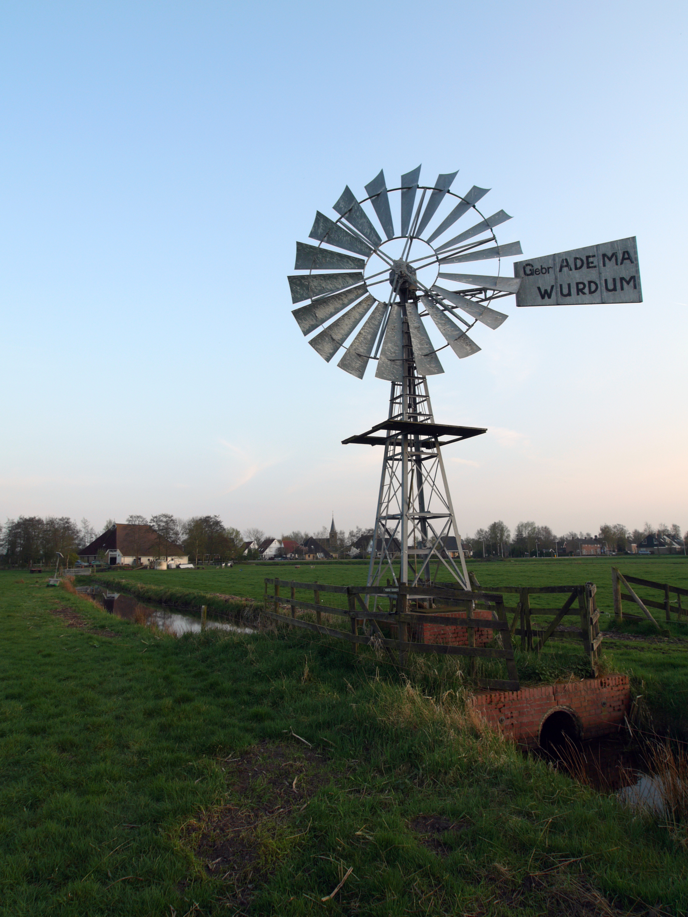 Windmotor Earnewâld